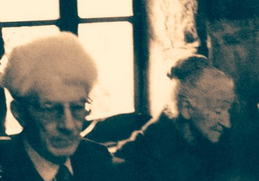 Frañsez Kervella et Marc'harid Gourlaouen